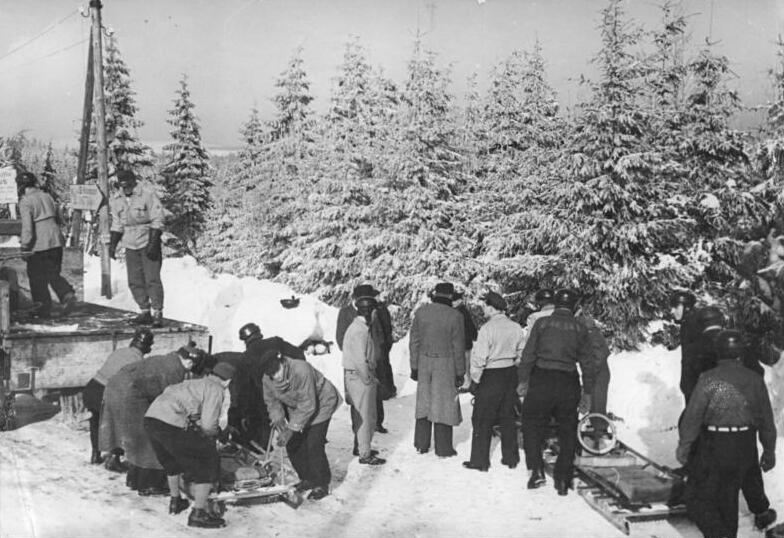 Illus Seidel Gr.-Jst. 13.2.51 II. Wintersportmeisterschaften der Deutschen Demokratischen Republik vom 11.-18.2.51 in Oberhof. UBz: An der Bob-Bahn. Die mehr als 3 Zentner schweren Bobs müssen mit Lkws wieder nach oben gebracht werden.